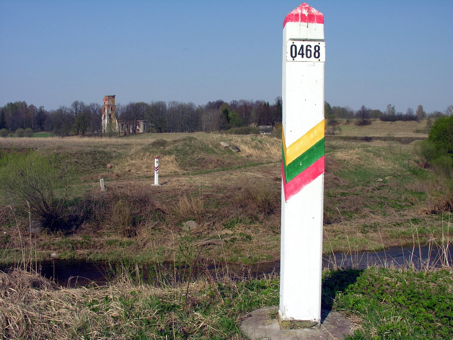 Lietuvos-Latvijos valstybės siena 2006 m. gegužės 5 d., Lietuva